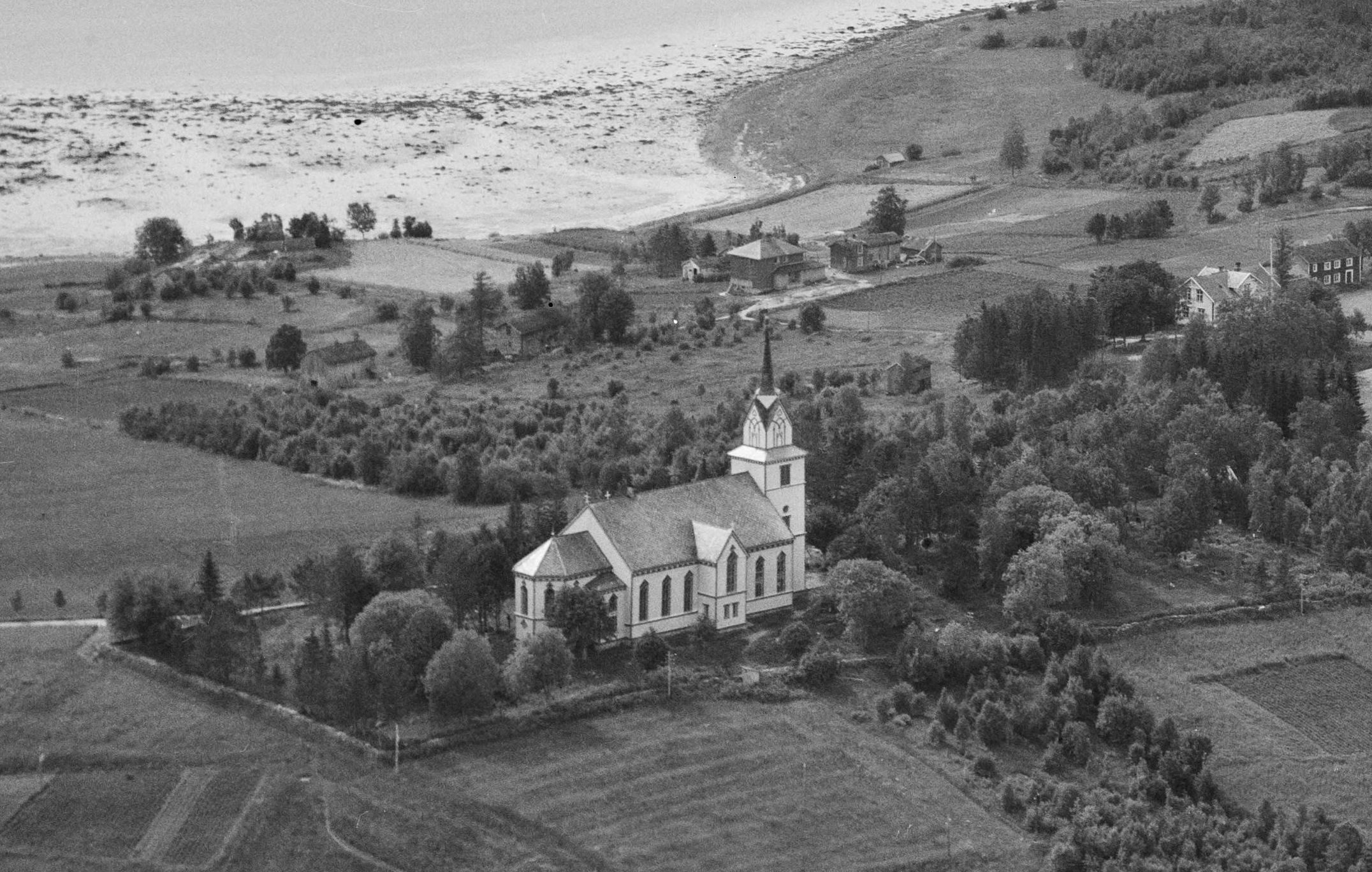 Skjerstad gamle kirke, fra 1877, brant ned 17. mai 1955.